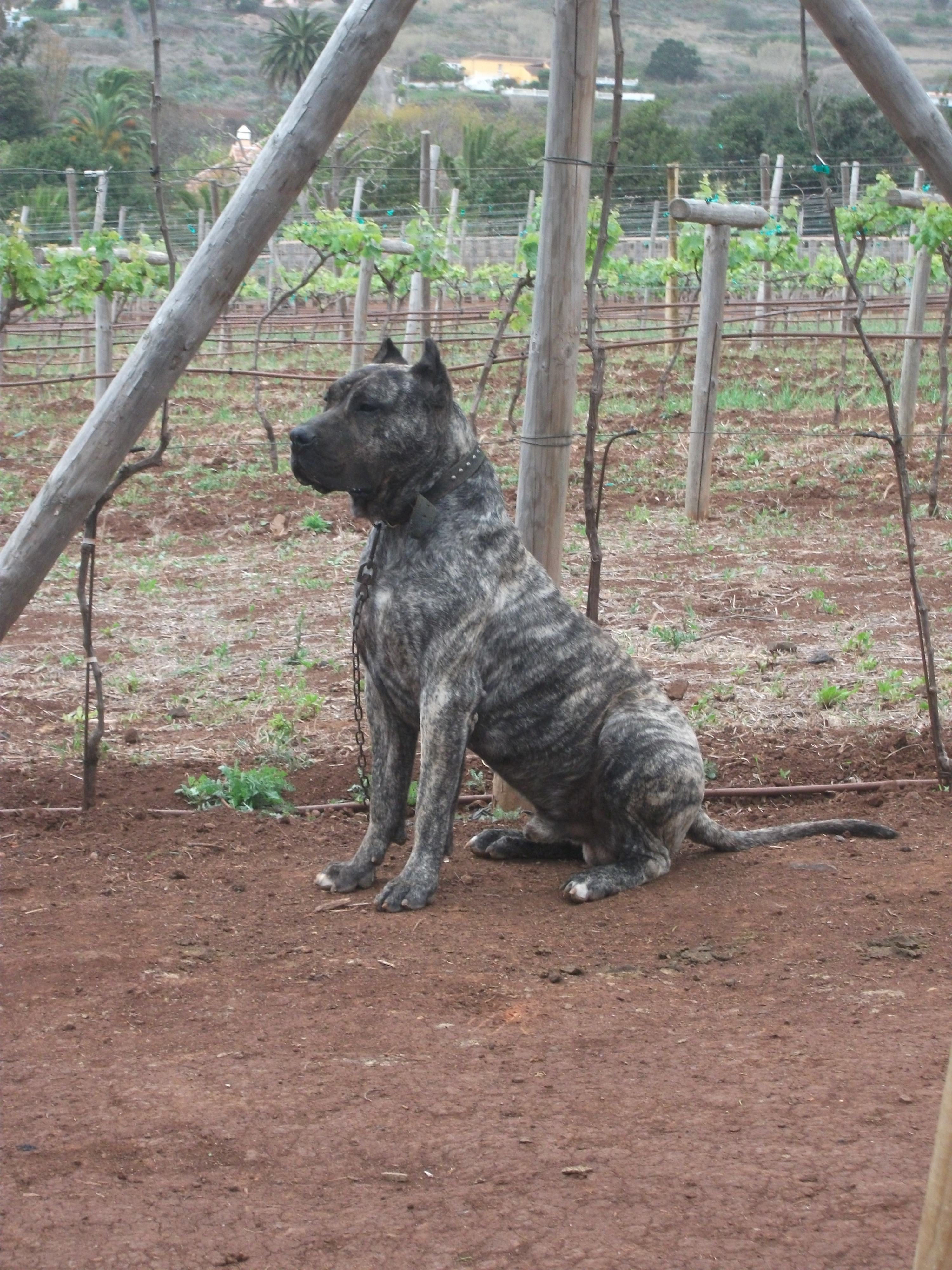 Macho de Dogo o Presa Canario en una exhibición en Tegueste, Tenerife.